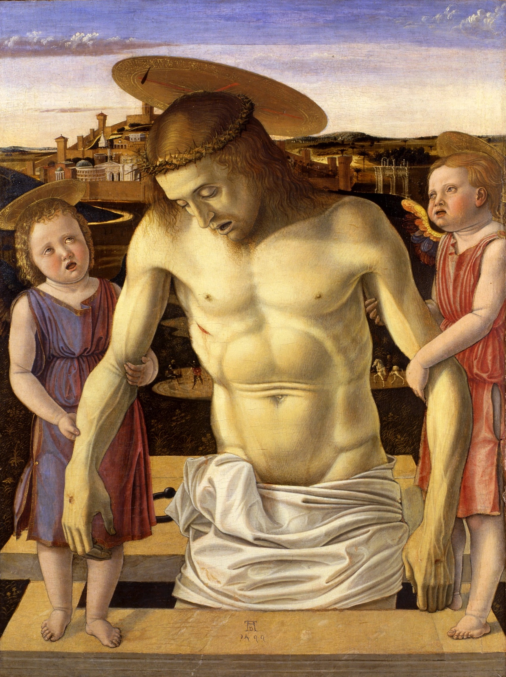 На картине монограмма Альбрехта Дюрера, вероятно поддельная